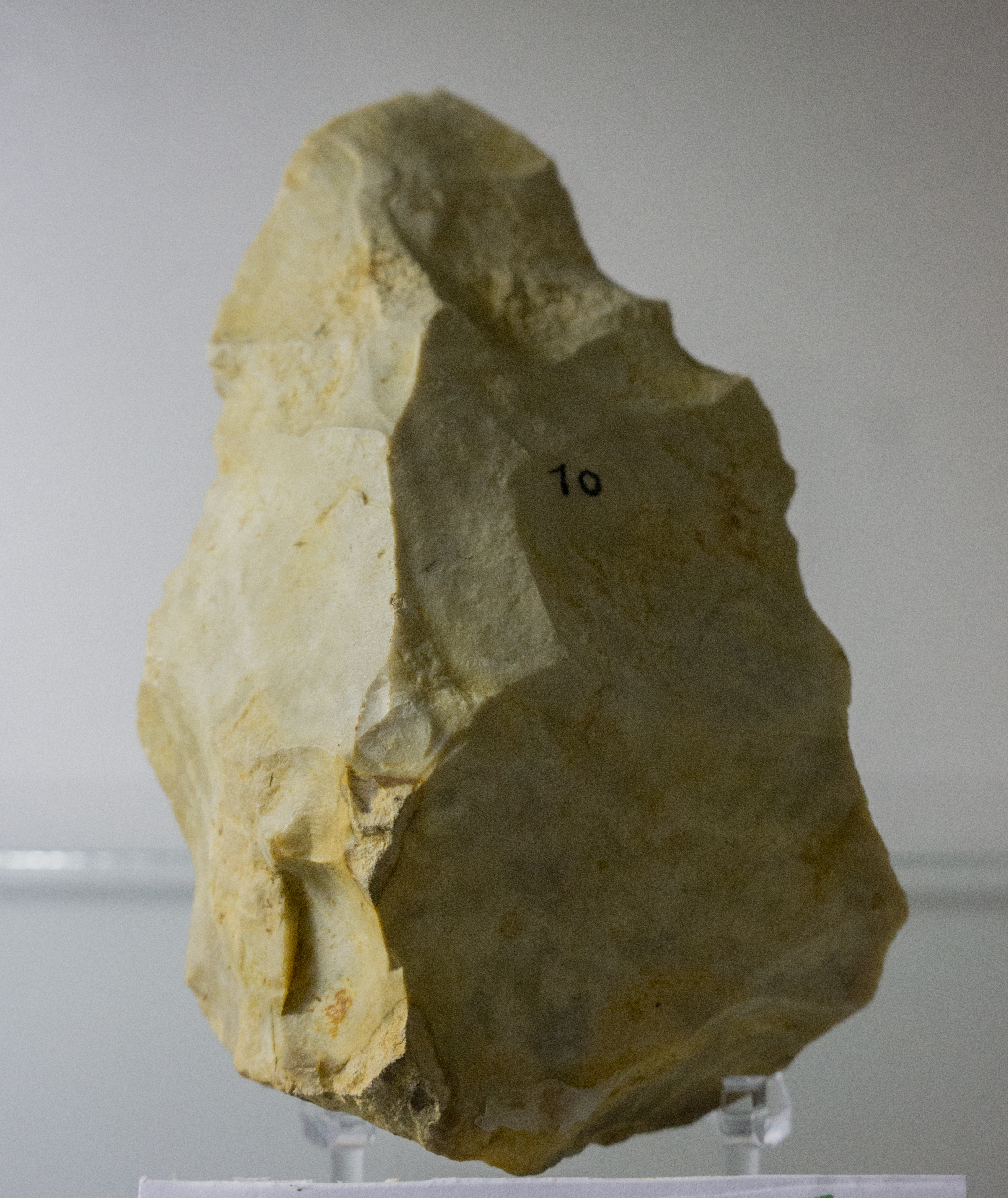 Verchizeuil, Saône-et-Loire